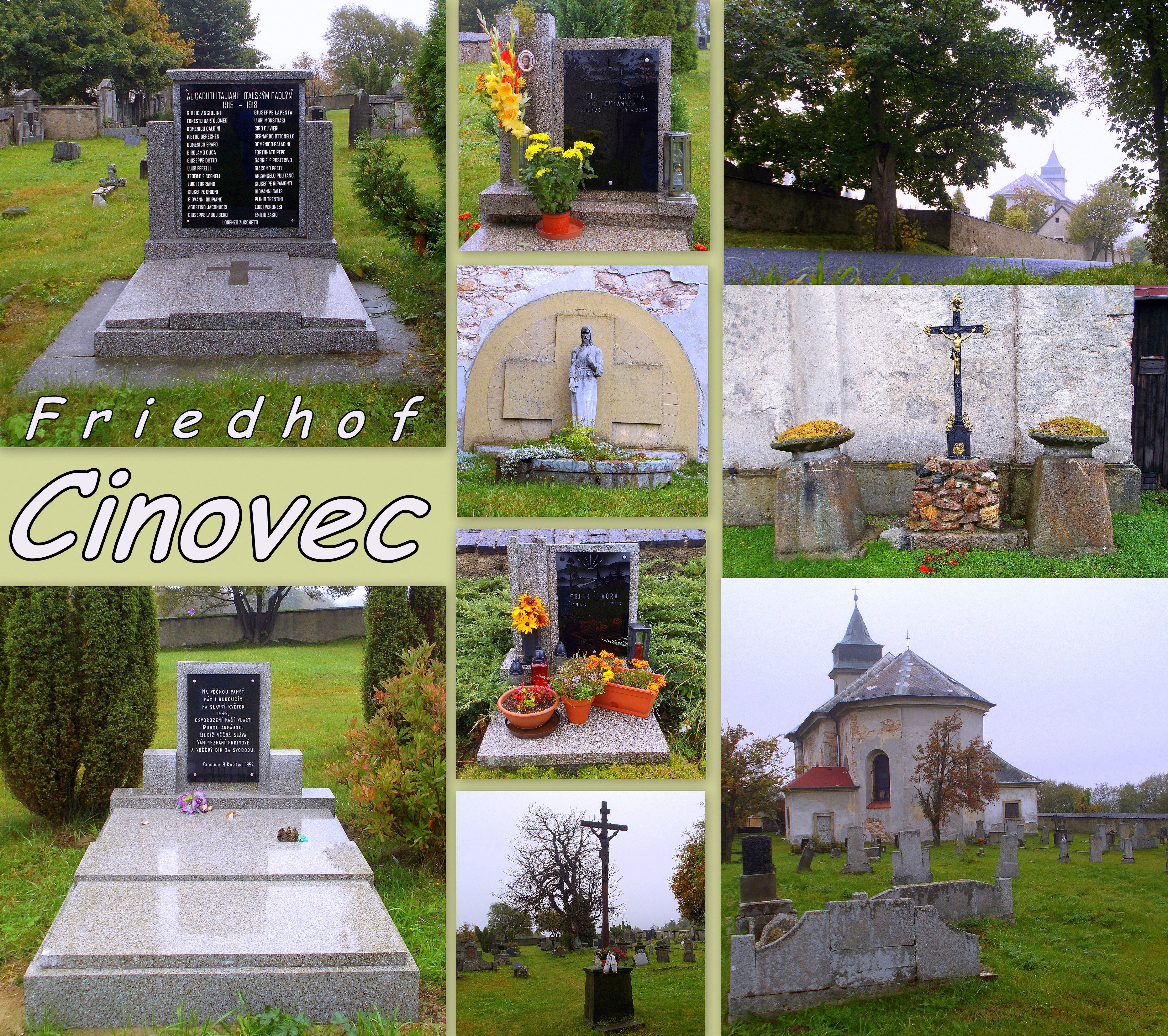 Auf dem Friedhof in Cinovec